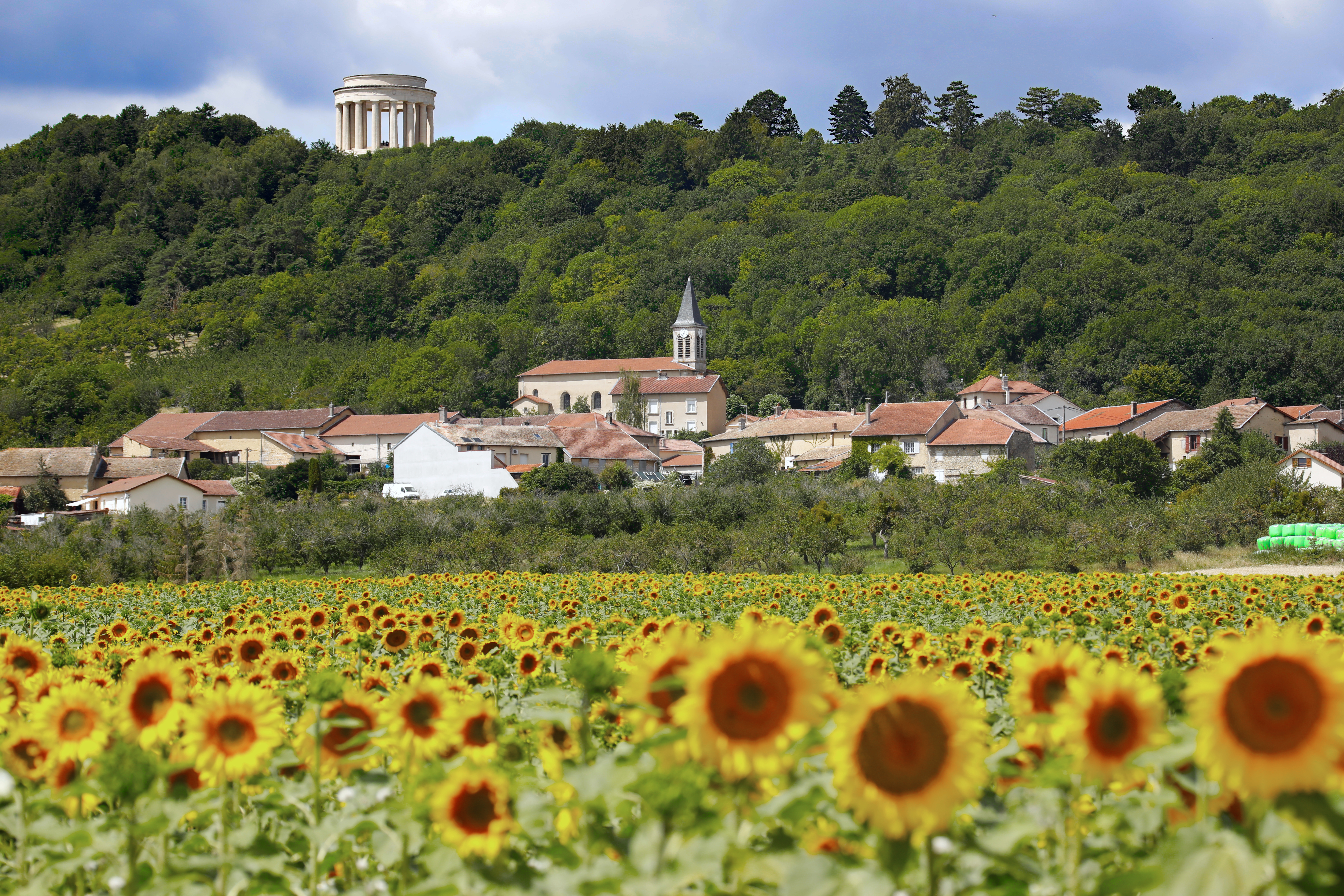 Het dorp Montsec aan de voet van de heuvel, met op de heuvel het Amerikaans monument ter nagedachtenis aan de slag die hier gevoerd werd in de Eerste Wereldoorlog